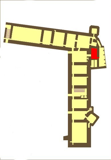 Łożnica Królewska zaznaczona na planie Piano Nobile Zamku Królewskiego na Wawelu